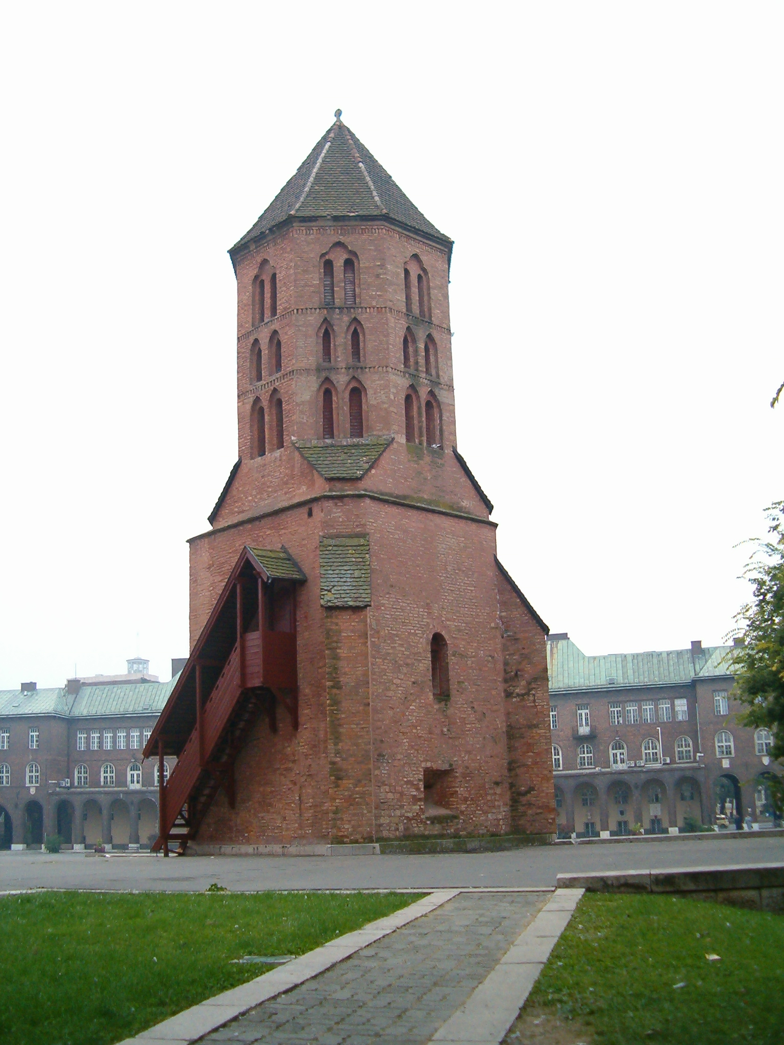 Szeged, Dömötör-torony own photo; Váradi Zsolt; 2005